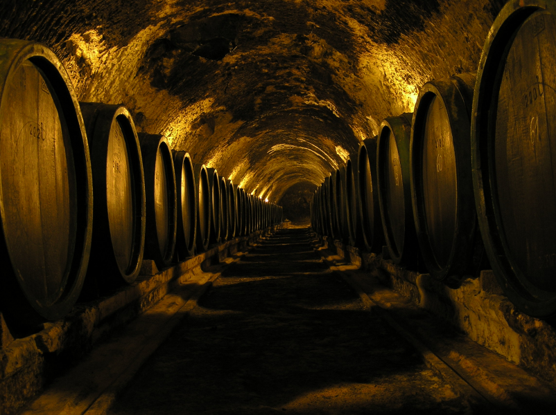 Cave de vieillissement de tokay en Slovaquie.